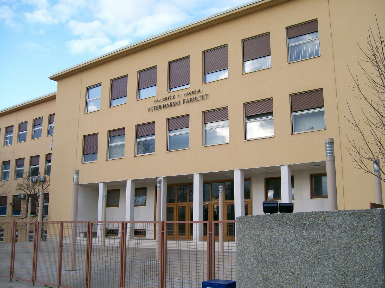 Zgrada Veterinarskog fakulteta u Zagrebu